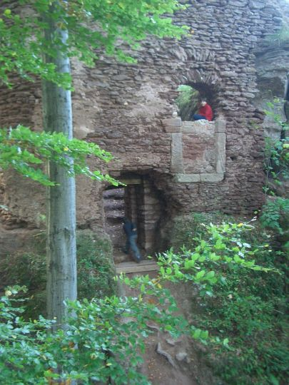 Fotka hradu Břecštejn, vchod